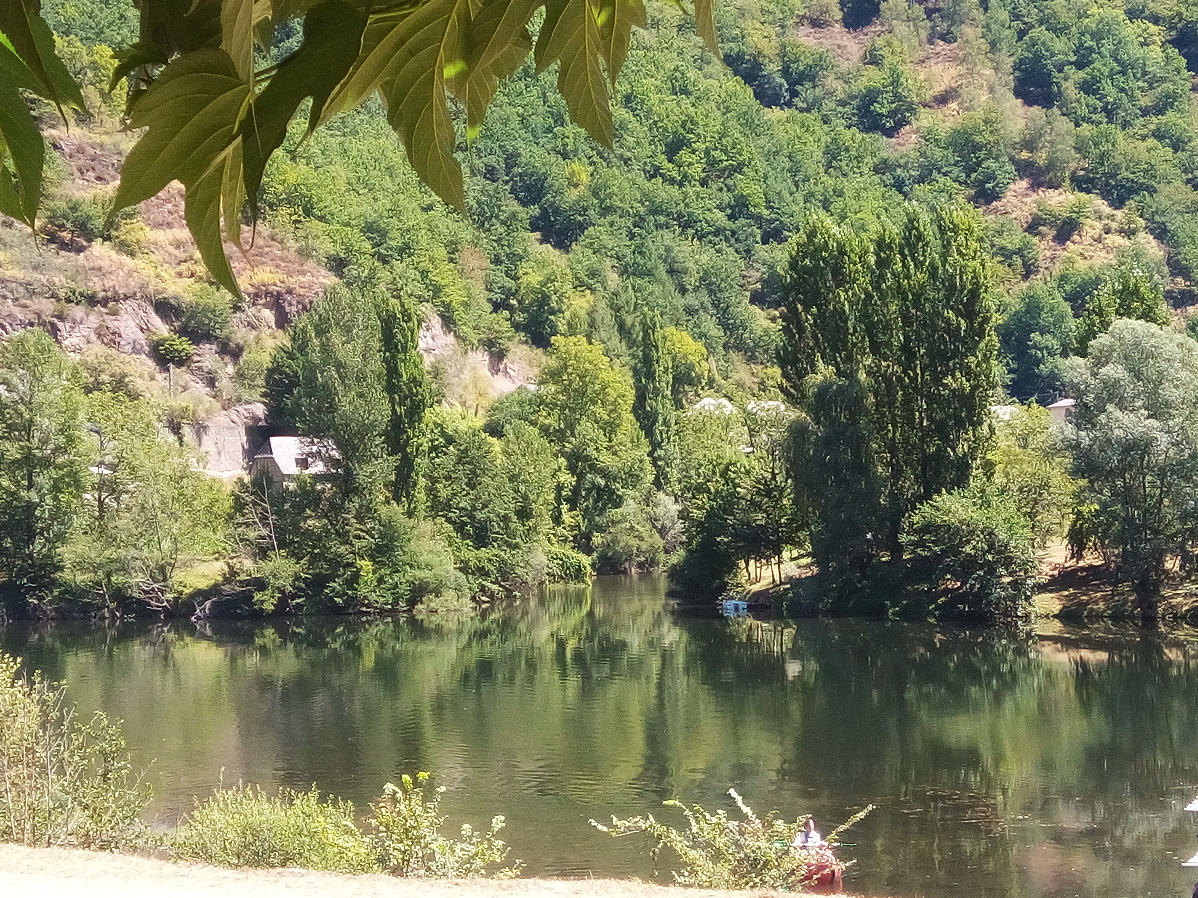 Dourdou de Conques en face se jet dans le Lot en bas (aval à gauche) à Grand-Vabre lieux dit "les pélies"